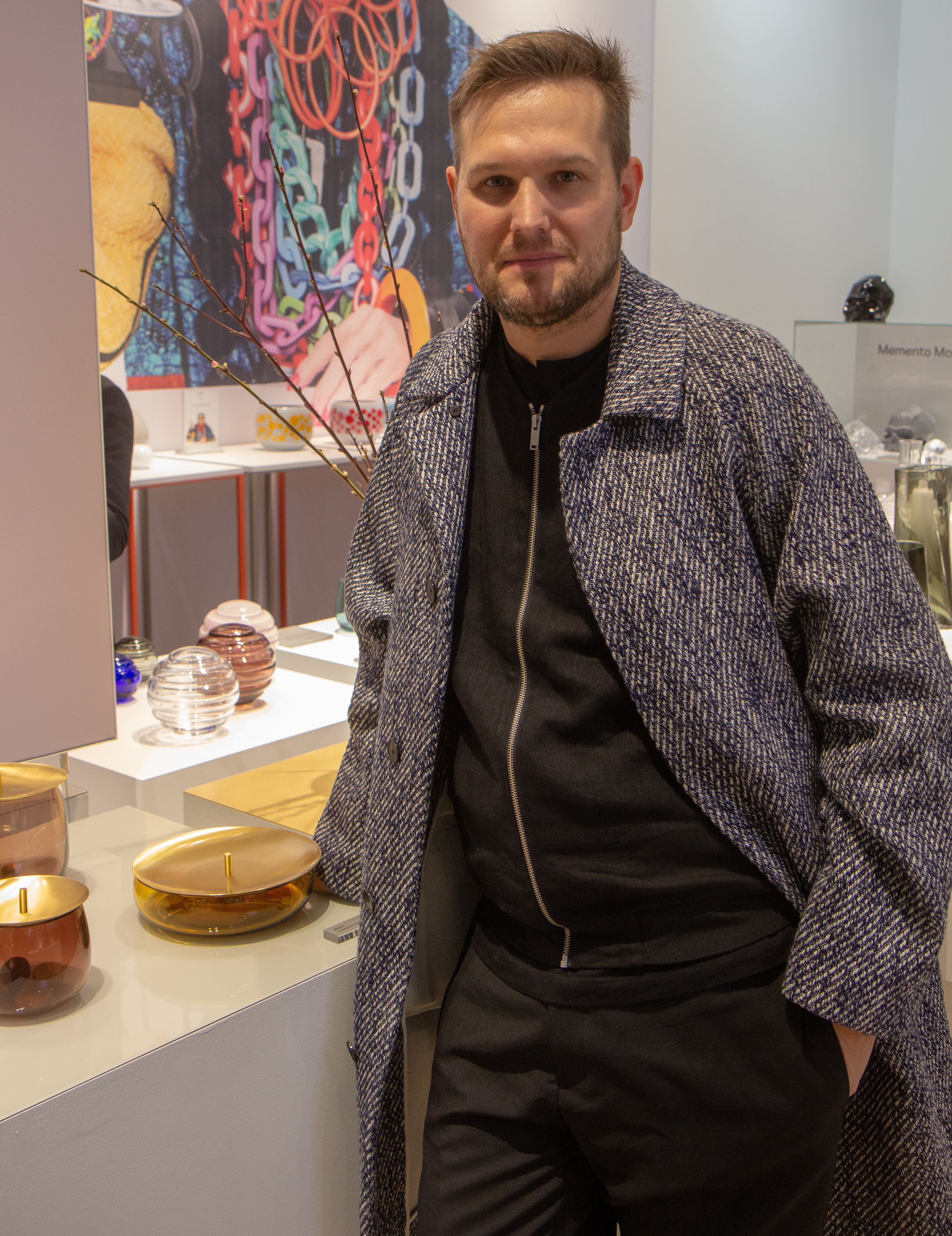 Messe Ambiente 2019 in Frankfurt.